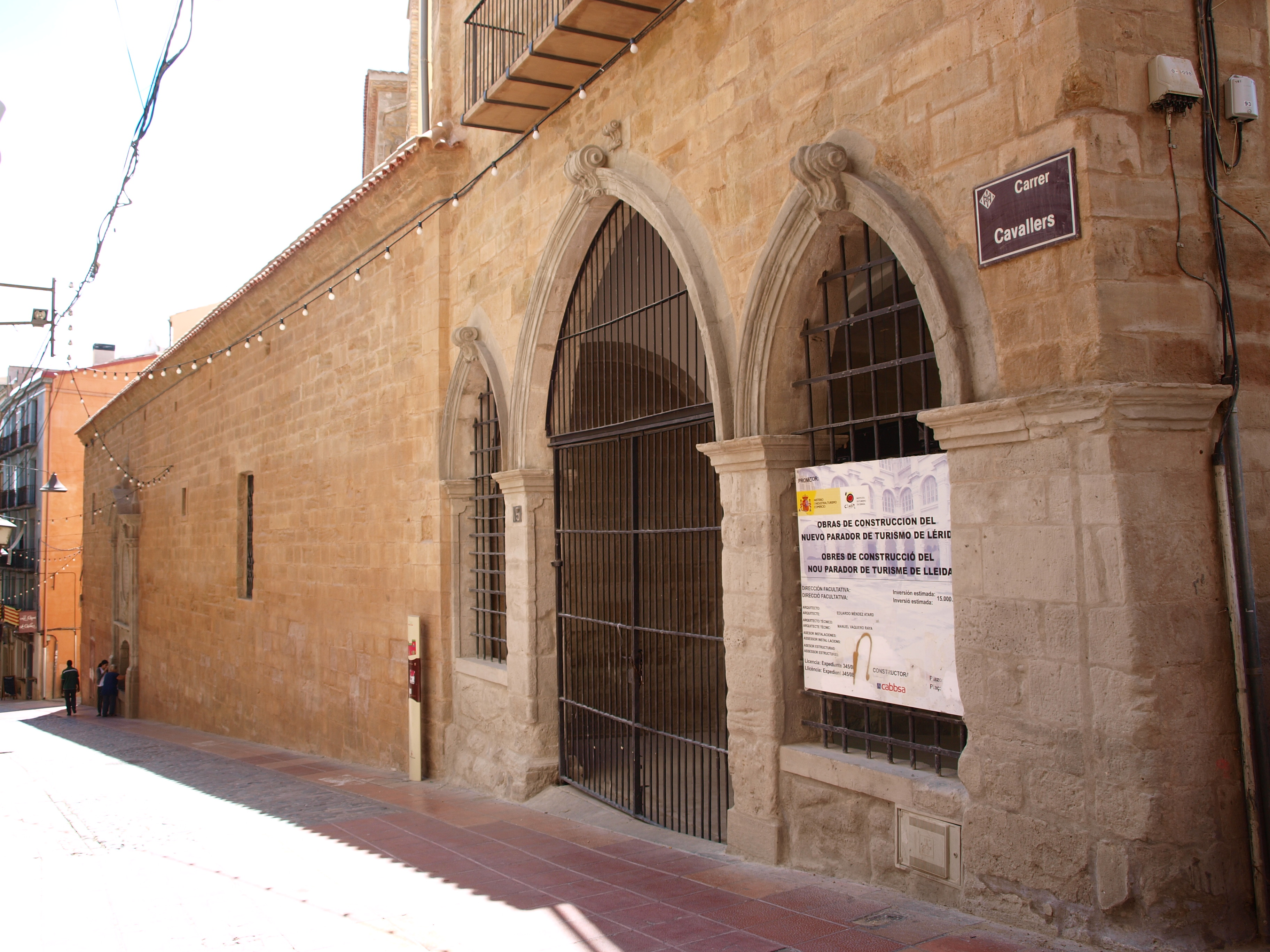 Façana de l'antic convent del Roser de Lleida